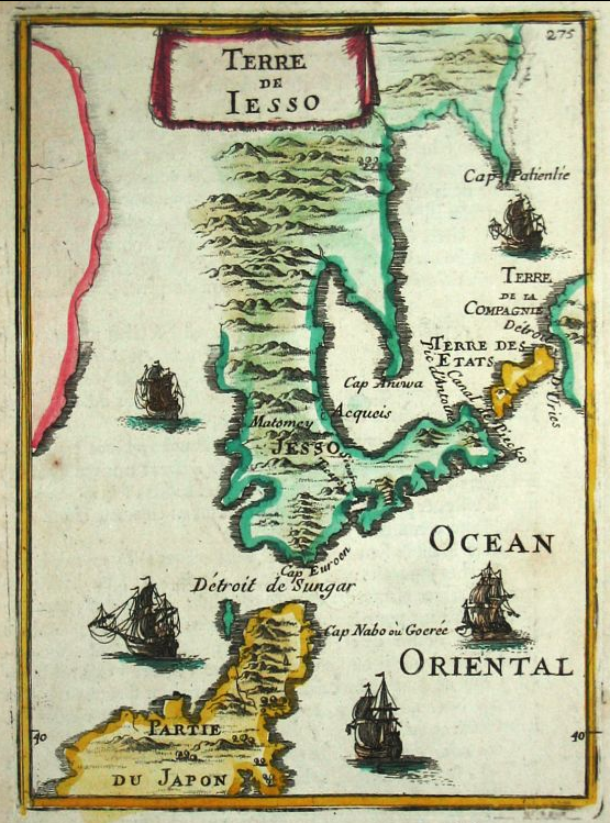 Alain Manneson Mallet (1603-1706), Description de l'Univers en 5 volumes, 1683 ː Terre de Yesso (Jesso, Hokkaido, Japon).